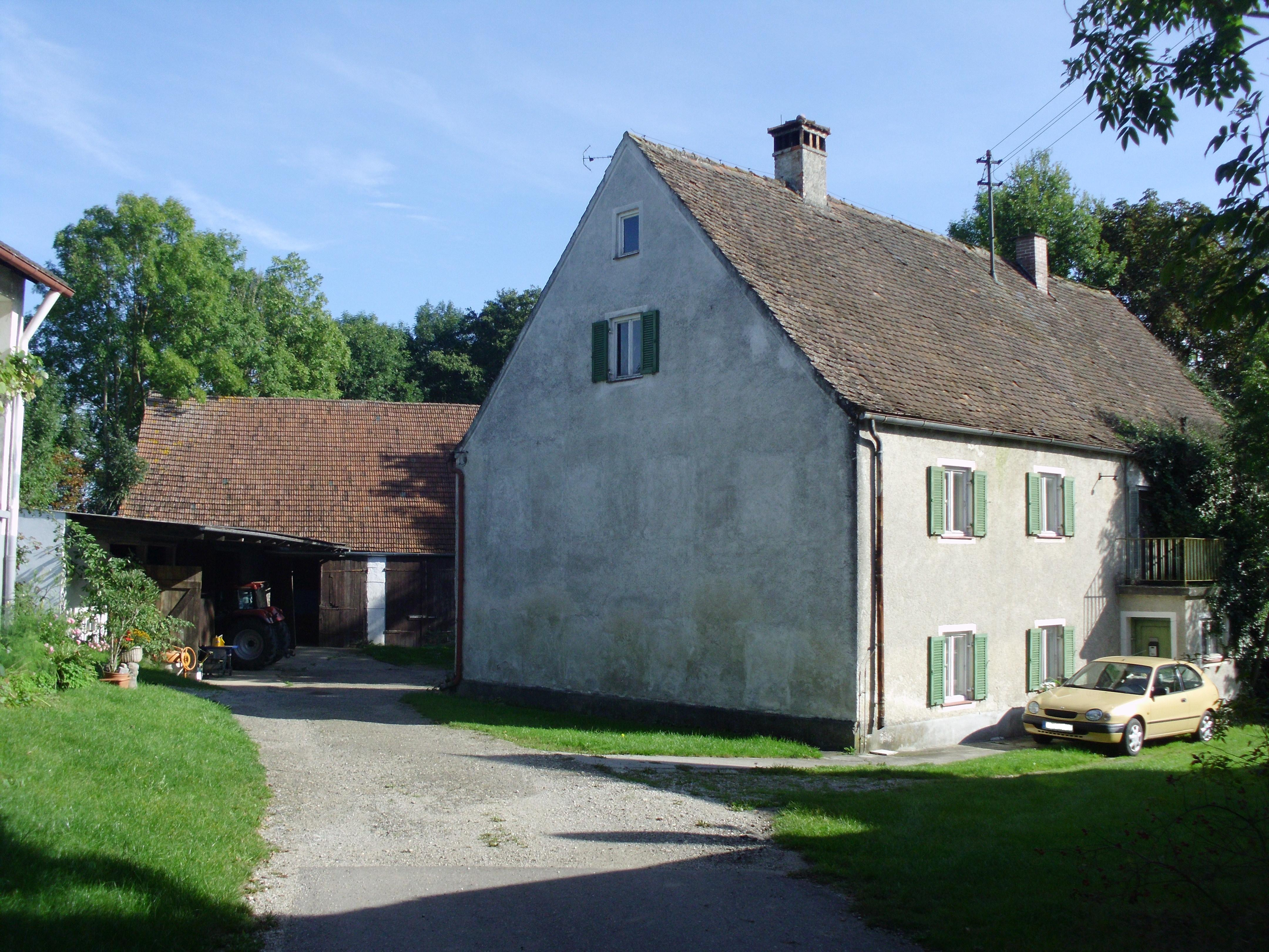 Knopfmühle, Ortsteil von Großmehring im oberbayerischen Landkreis Eichstätt